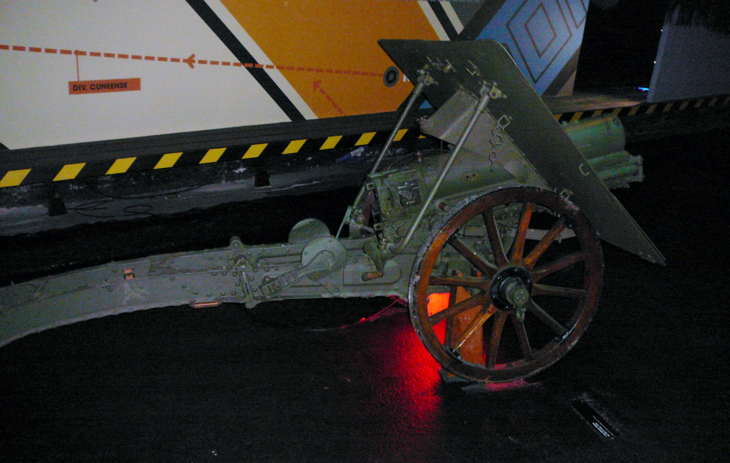 Škoda 7,5 cm Vz. 1915 presso il Museo storico degli Alpini di Trento